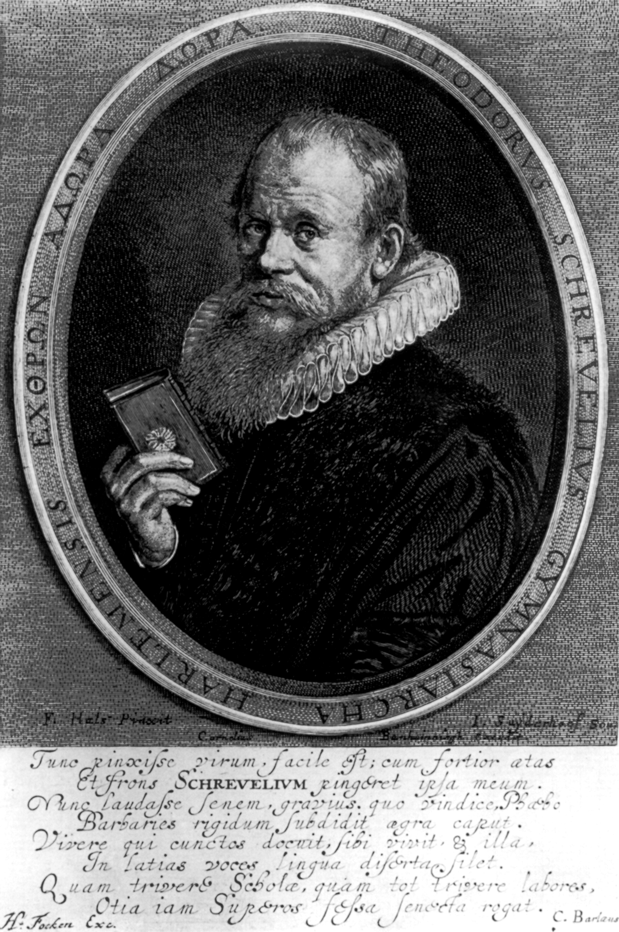 Theodor(us) Schrevel(ius). Stich von Jonas Suyderhoeff nach einem Gemälde des Malers Franz Hals (1581-1666). Der Stich stellt den Humanisten, Schriftsteller, Dichter und Rektor der Haarlemer Lateinschule dar. Übersetzung der Inschriften: Im Oval: „Echthron adora dora“ (griech.): „Geschenke von Feinden sind keine Geschenke“. „Theodorus Schrevelius Gymnasiarcha Harlemensis“ (lat.): „Theodor Schrevel Schulleiter in Haarlem“. Übersetzung des lateinischen Textes unterhalb des Portraits: „Damals den Mann gemalt zu haben, leicht ist es, da kräftiges Alter und Antlitz selbst meinen Schrevel gemalt haben. Jetzt den Greis zu loben, dem - Rache des Phoebus - traurige Fremde ein erstarrtes Haupt gab, ist schwerer. Der alle leben lehrte, lebt allein sich, und seine Zunge, beredt in lateinischen Worten, sie schweigt. Wie vergeblich die Schulen, so vergeblich die vielen Mühen, um Ruhe bittet das Greisengrab die noch Lebenden“.